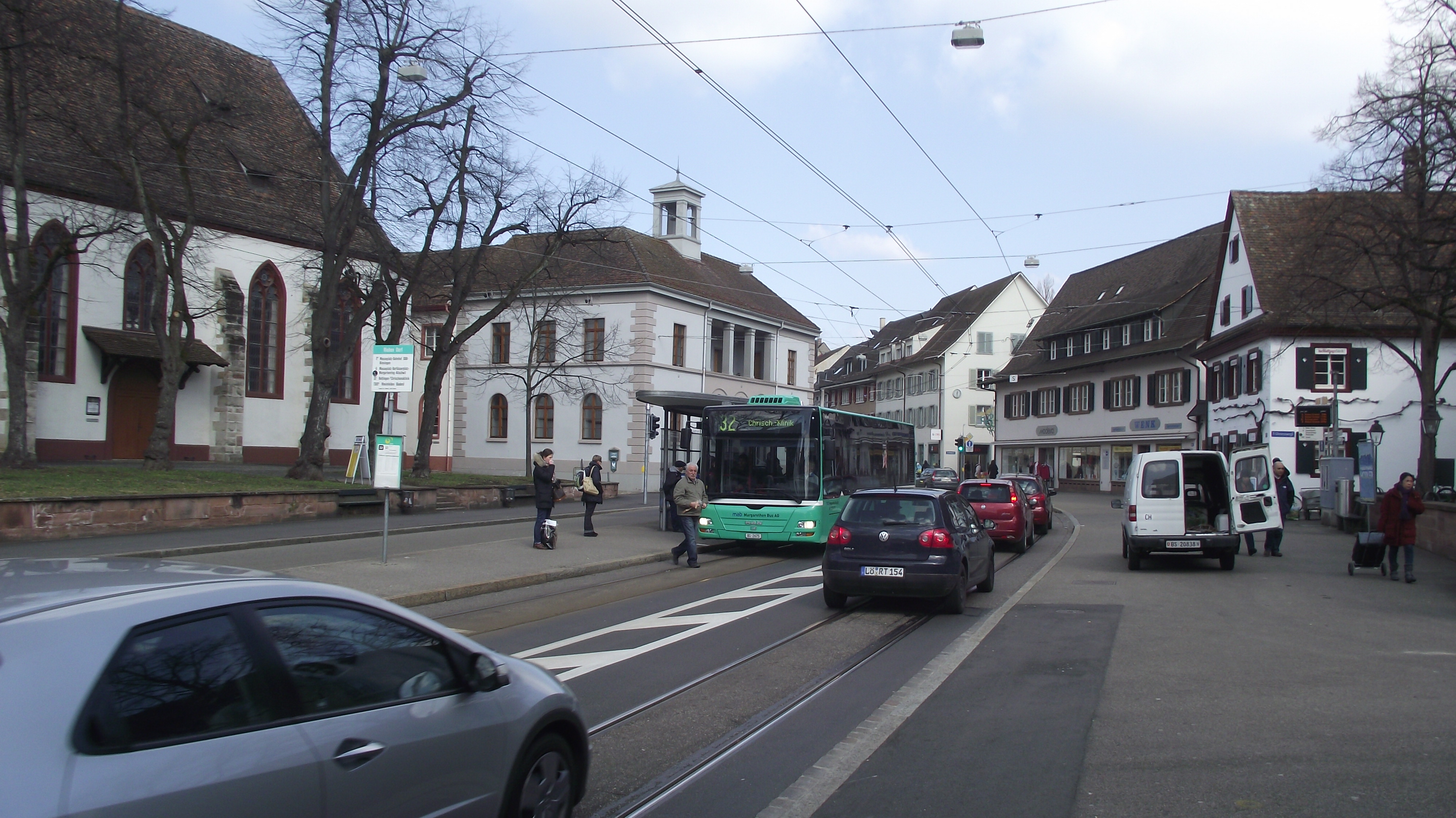 BVB bus 32 in Riehen bij de halte Riehen Dorf.